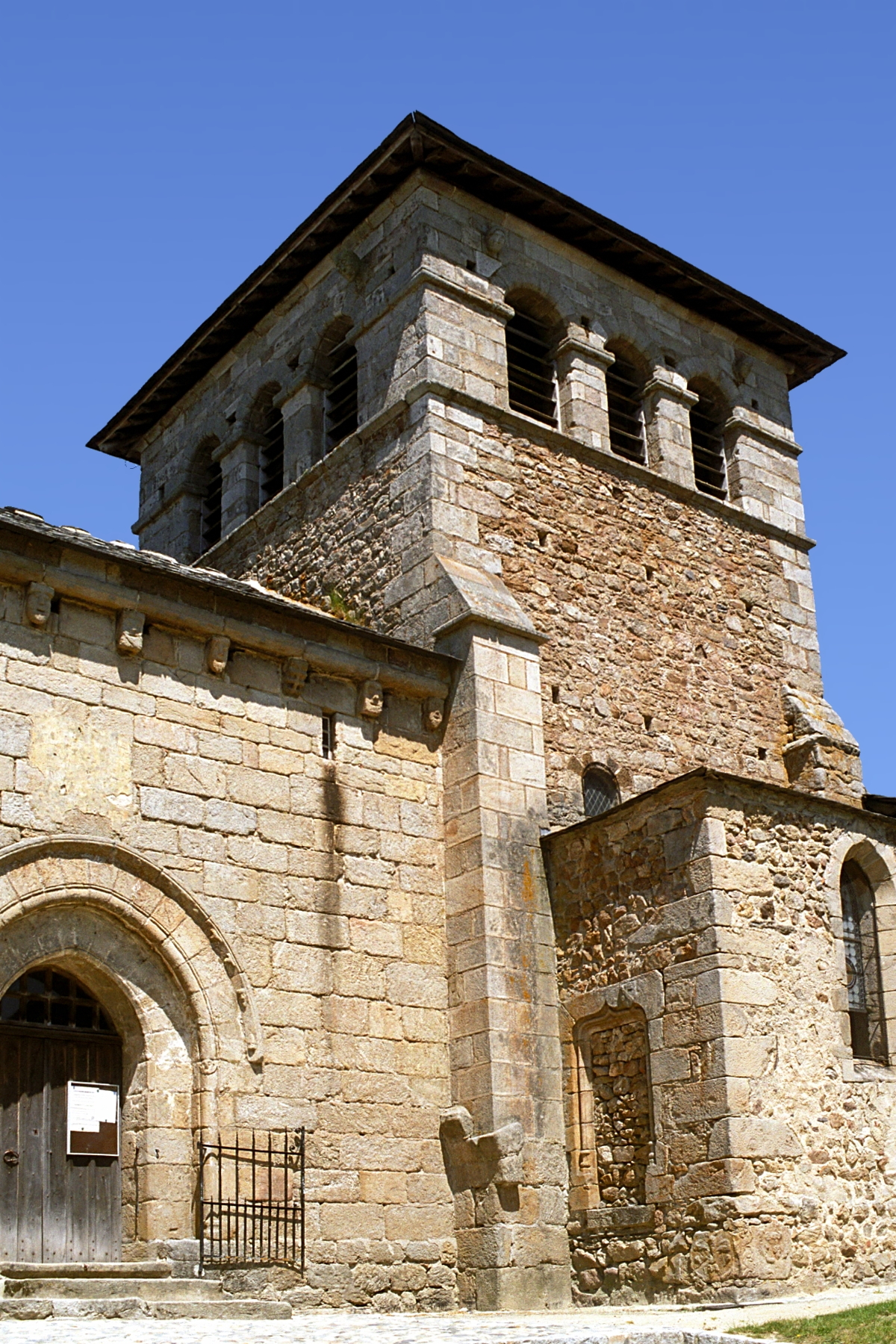 France - Auvergne - Velay (Haute-Loire) - Église de Saint-Victor-sur-Arlanc